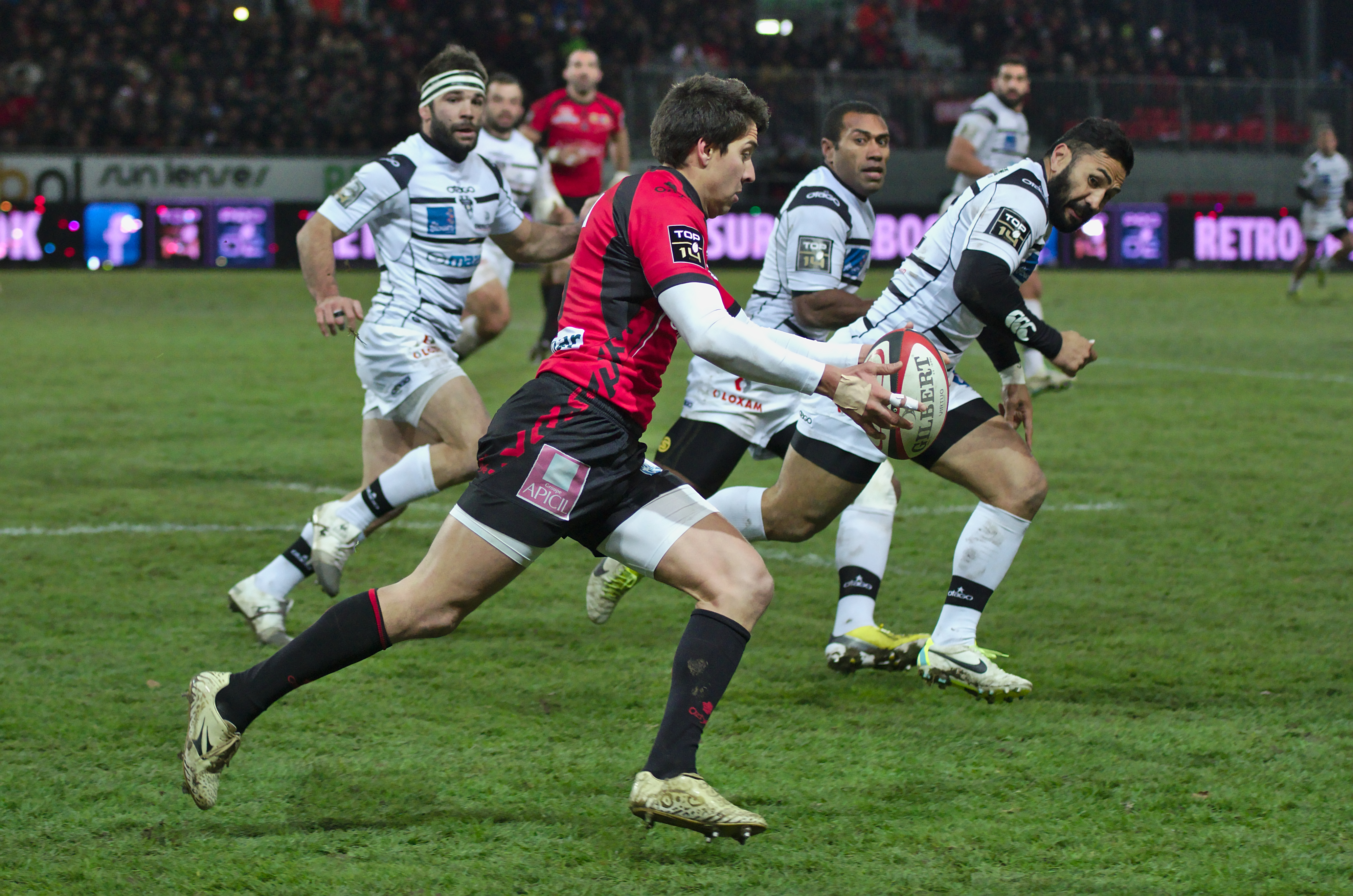 USO-CAB - 20131130 - Lucas Amorosino